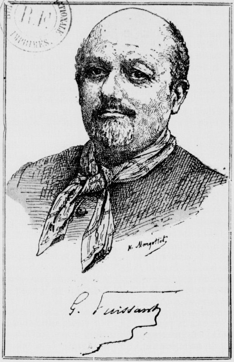 Portrait et signature de G. Puissant.